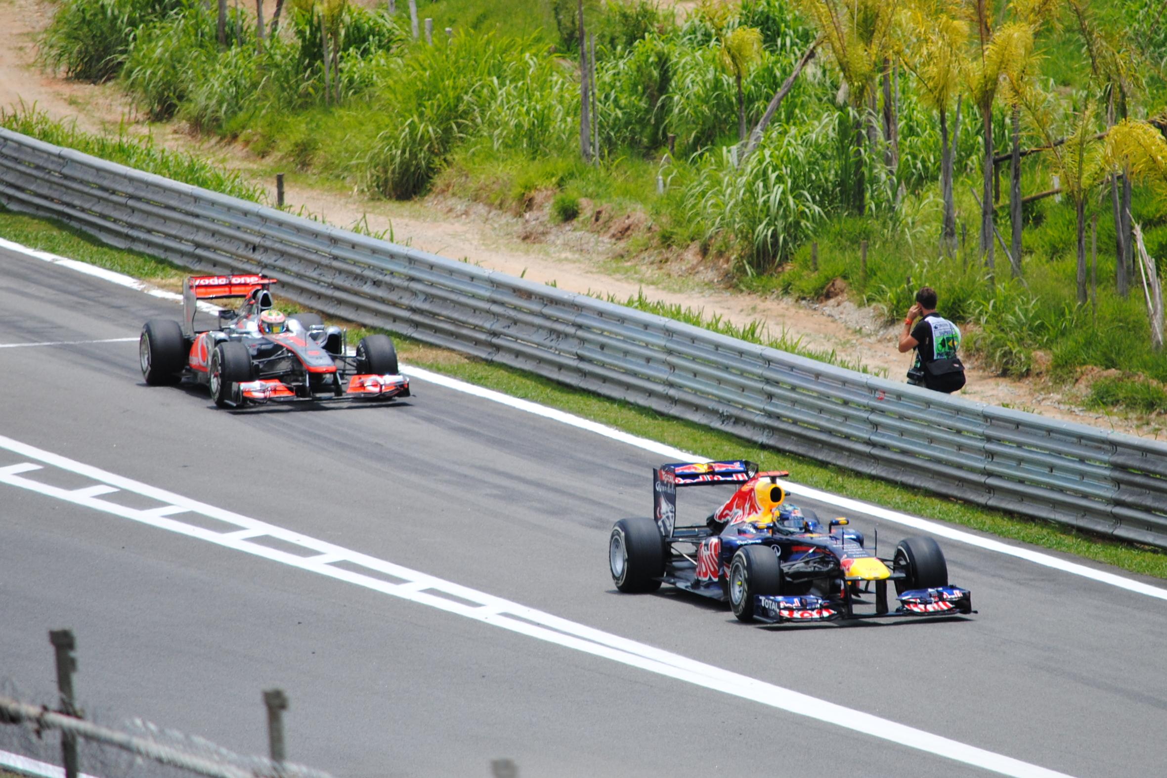 GP Brasil de Formula 1 - Interlagos, São Paulo.